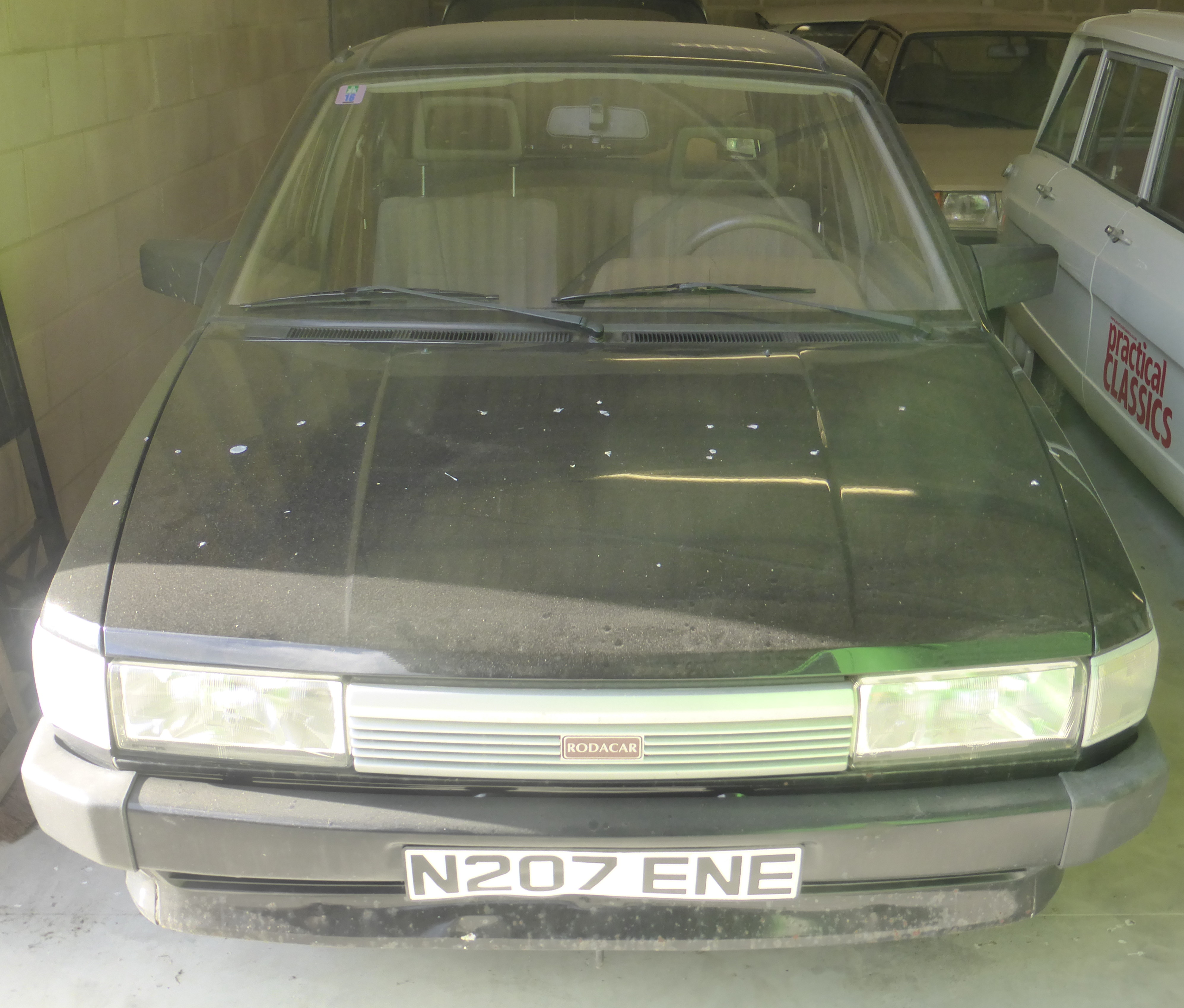 Bulgarian-built Austin... From a unique private collection.